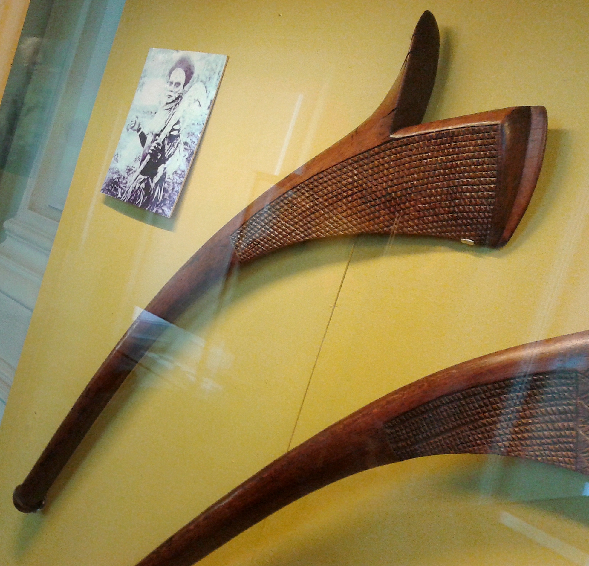 Português do Brasil: Clavas - Ilha de Java. Coleção de etnologia do Museu Nacional/UFRJ - Rio de Janeiro, Brasil.